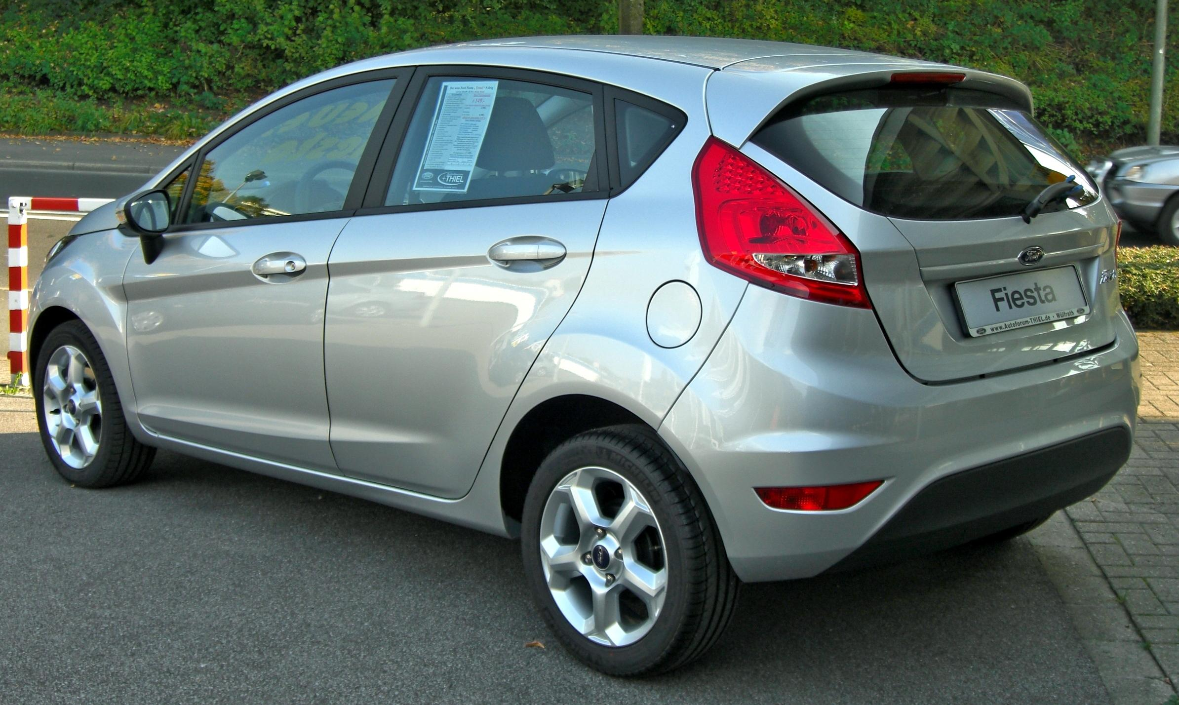 Ford Fiesta MK6 (2008) „Trend“